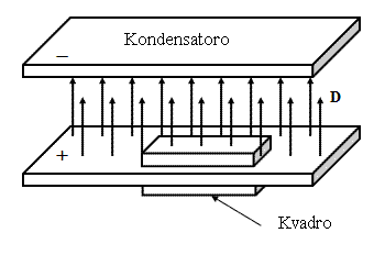 Kondensatoro kun paralelaj platoj. Imagante ortangulan paralelepipedan skatolon, oni povas uzi la gauxsan legxon por ekspliki rilaton inter elektra indukdenso kaj liberaj sxargoj.